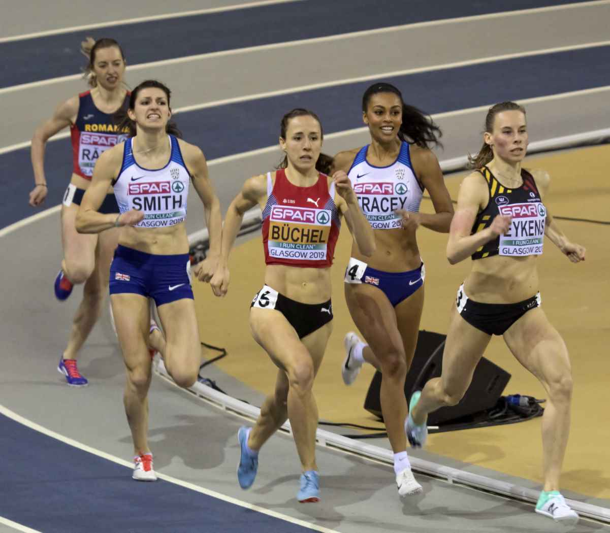 EKI20285 800m semi eykens buchel